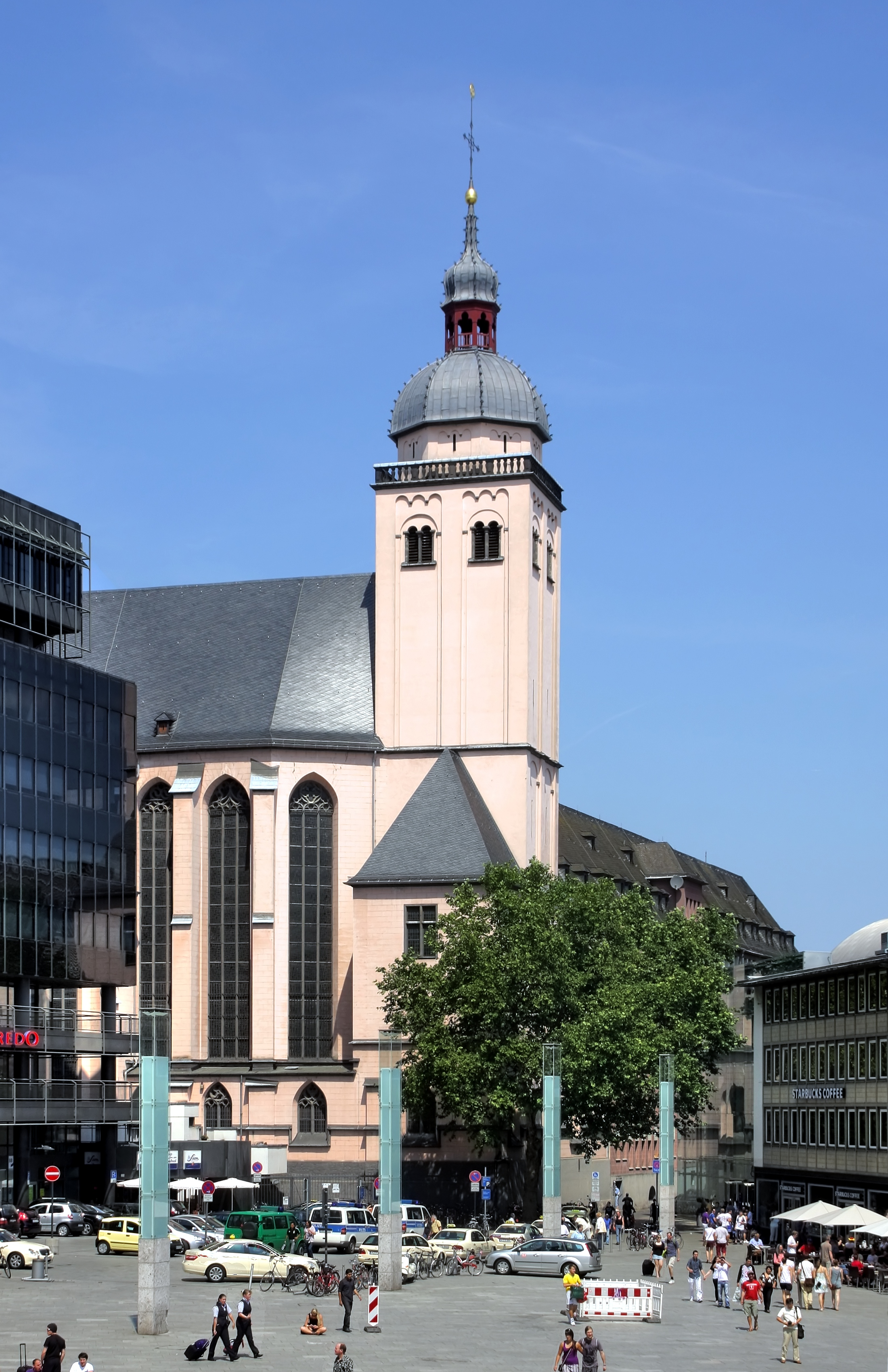 Ostturm der Kirche St. Mariä Himmelfahrt, Köln. Im Vordergrund ist der Bahnhofsvorplatz vom Hauptbahnhof Köln zu sehen.